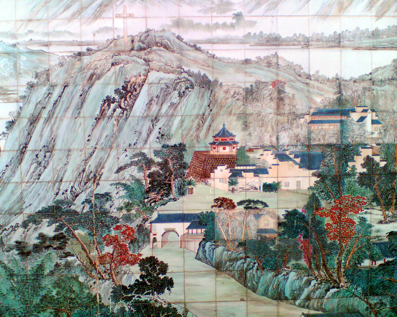 道風山壁畫